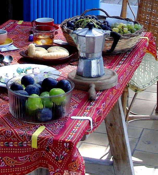 Tisch mit vier Tischdeckenzwingen an den vier Tischecken